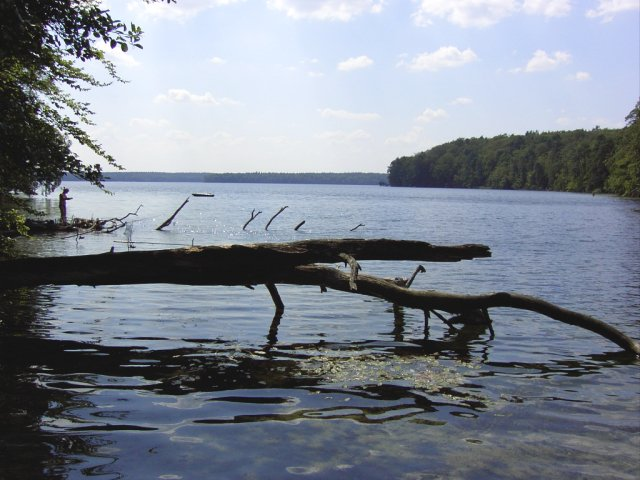 Der Stechlinsee (Landkreise Oberhavel und Ostprignitz Ruppin, Brandenburg)